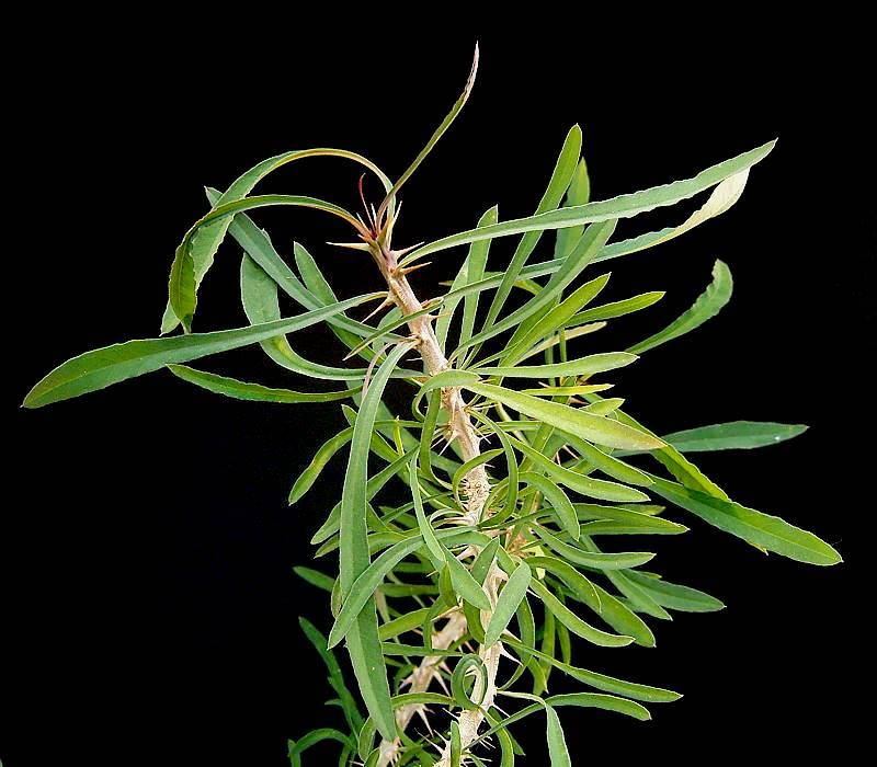 Euphorbia sakarahaensis